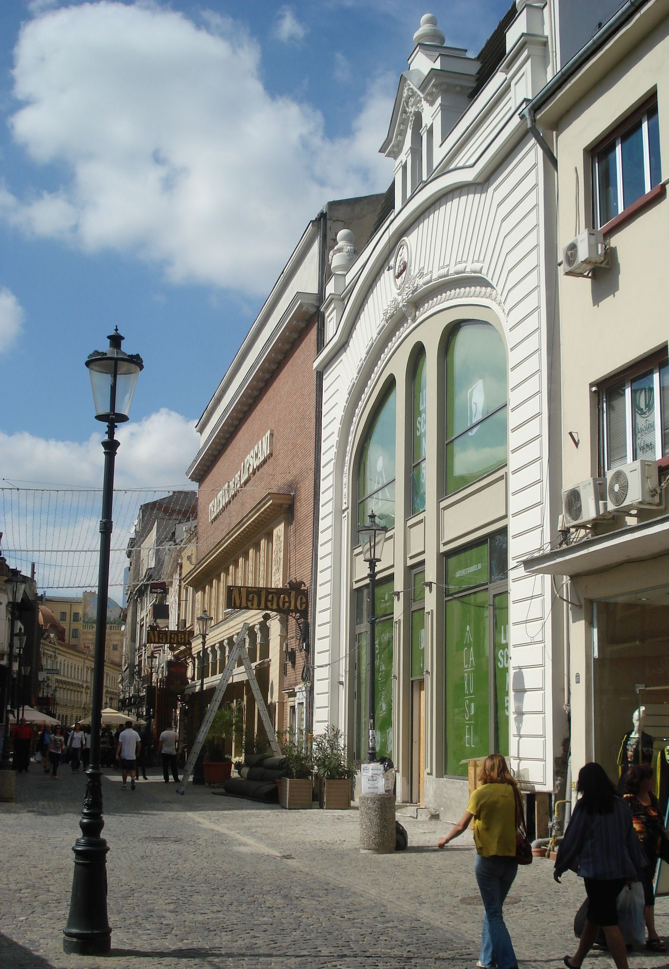 Str. Lipscani nr. 55 (Casă cu prăvălie)